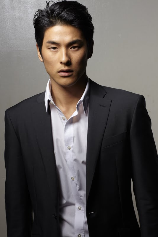 2013初代ミスタージャパン鈴木貴之